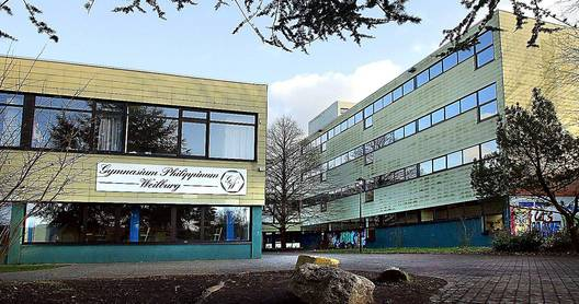 Fraontansicht Gymnasium Phillipinum Weilburg